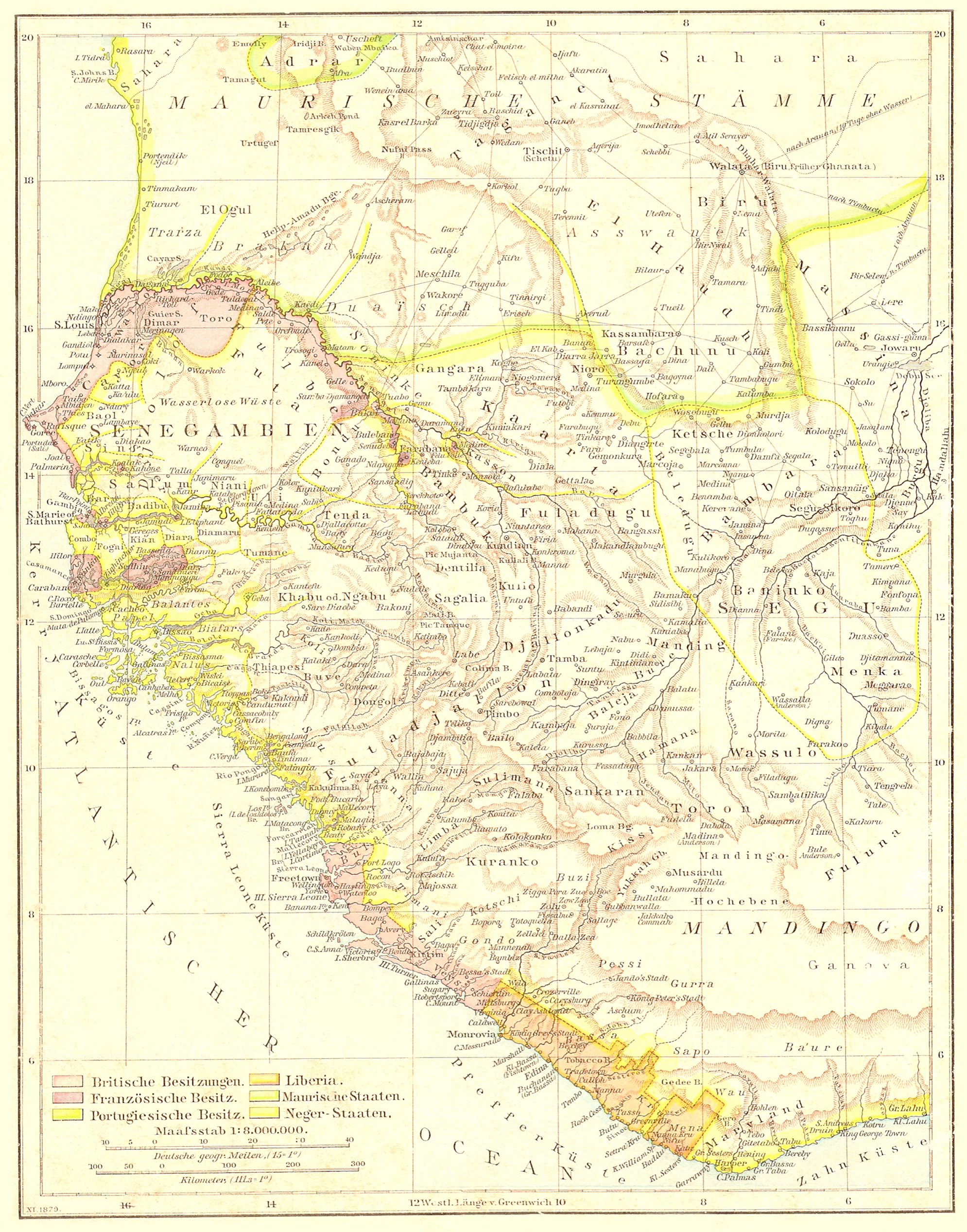 Senegambia, Andrees Allgemeiner Handatlas, 1st Edition, Leipzig (Germany) 1881, Page 96, Map 1.